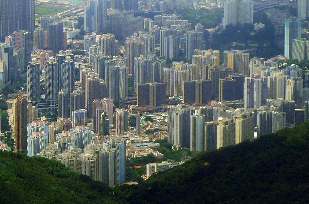 Wong Tai Sin